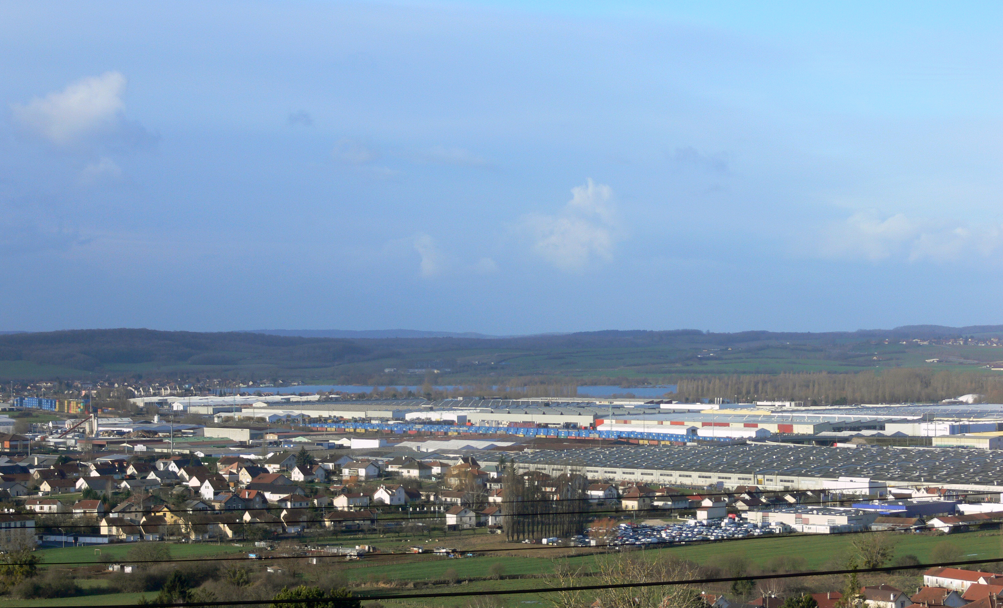 Vue des usines Peugeot, de Noidans-lès-Vesoul et de Vaivre-et-Montoille (lac de Vaivre) depuis les pentes de Cita à Echenoz-la-Méline